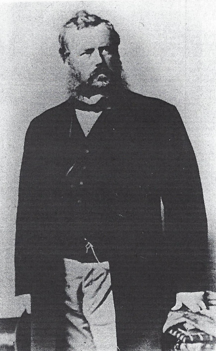 Fotografie von Lothar von Wurmb (1824-1890)